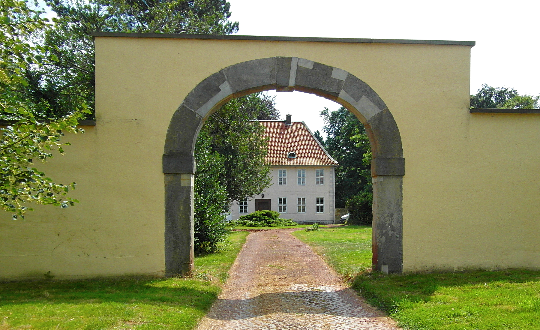 Blick durch einen Torbogen der Gutsmauer auf das Obergut im Barsinghäuser Stadtteil Egestorf in Niedersachsen